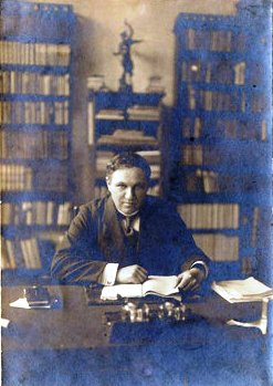 Hevesi Sándor (1873-1939) kb. 40 eves korában.